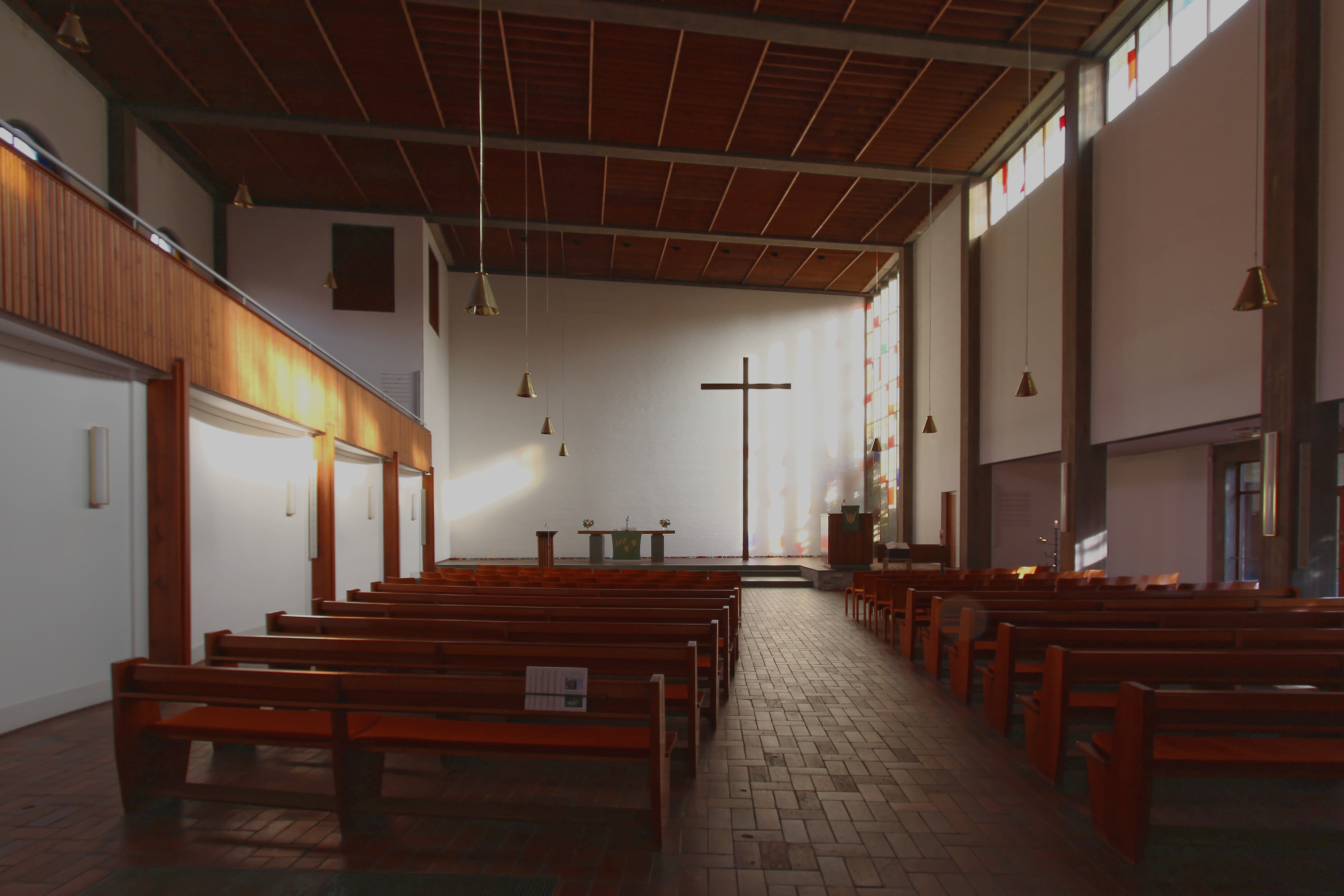 Hamburg-Harburg, St. Johannis Kirche, Innenraum This is a photograph of an architectural monument.